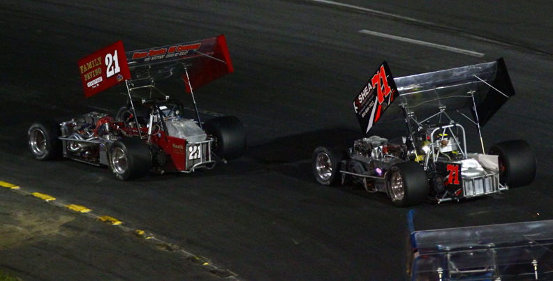 International SuperModified Association à l'Autodrome Chaudière le 22 juin 2013 - Photo Paul-Émile Poulin-Jacques